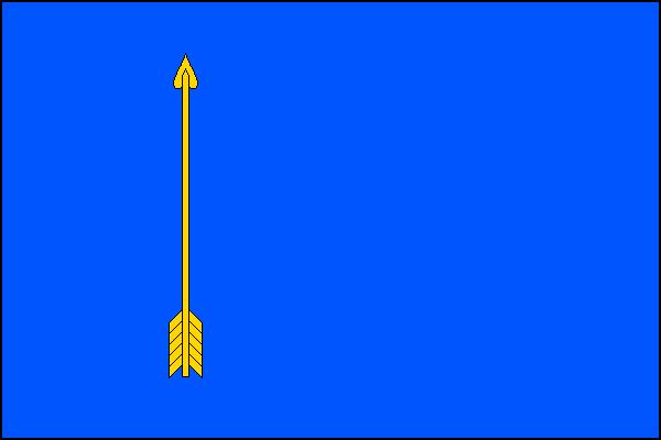 Vlajka obce Střelice v okrese Brno-venkov